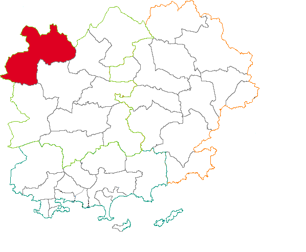 Situation du canton dans la département du Var (83), France